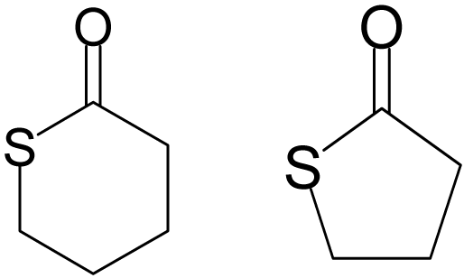 Bsp. Thiolacton